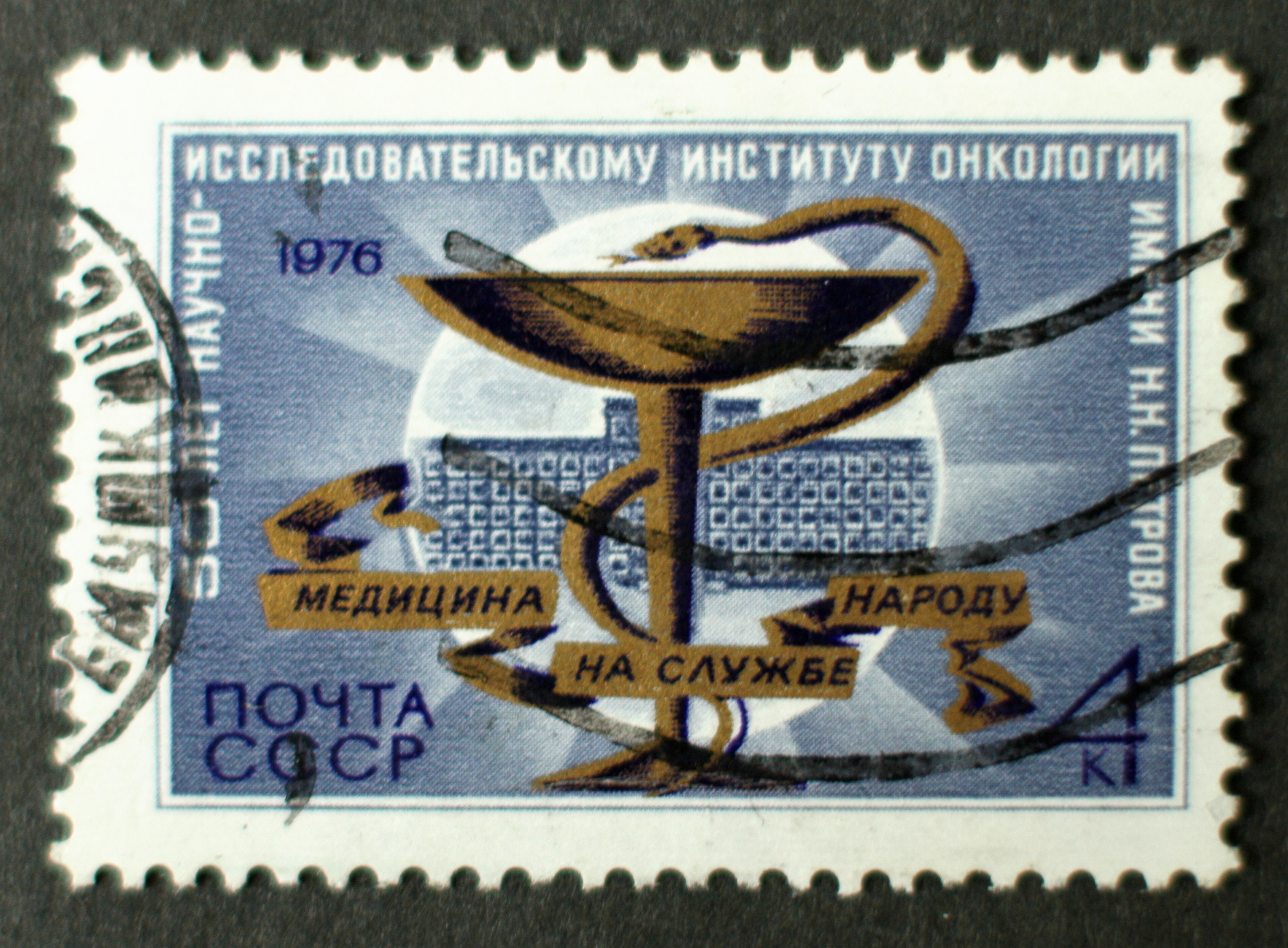 Briefmarke, Sowjetunion